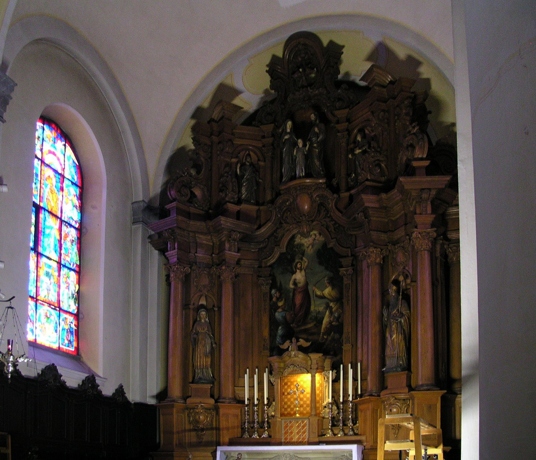 Altar der rk. Pfarrkirche St. Sebastian in Würselen. Die Datei wurde bearbeitet, um die perspektivische Verzerrung zu entfernen. Dadurch kann das Seite-Höhe-Verhältnis verfälscht worden sein.